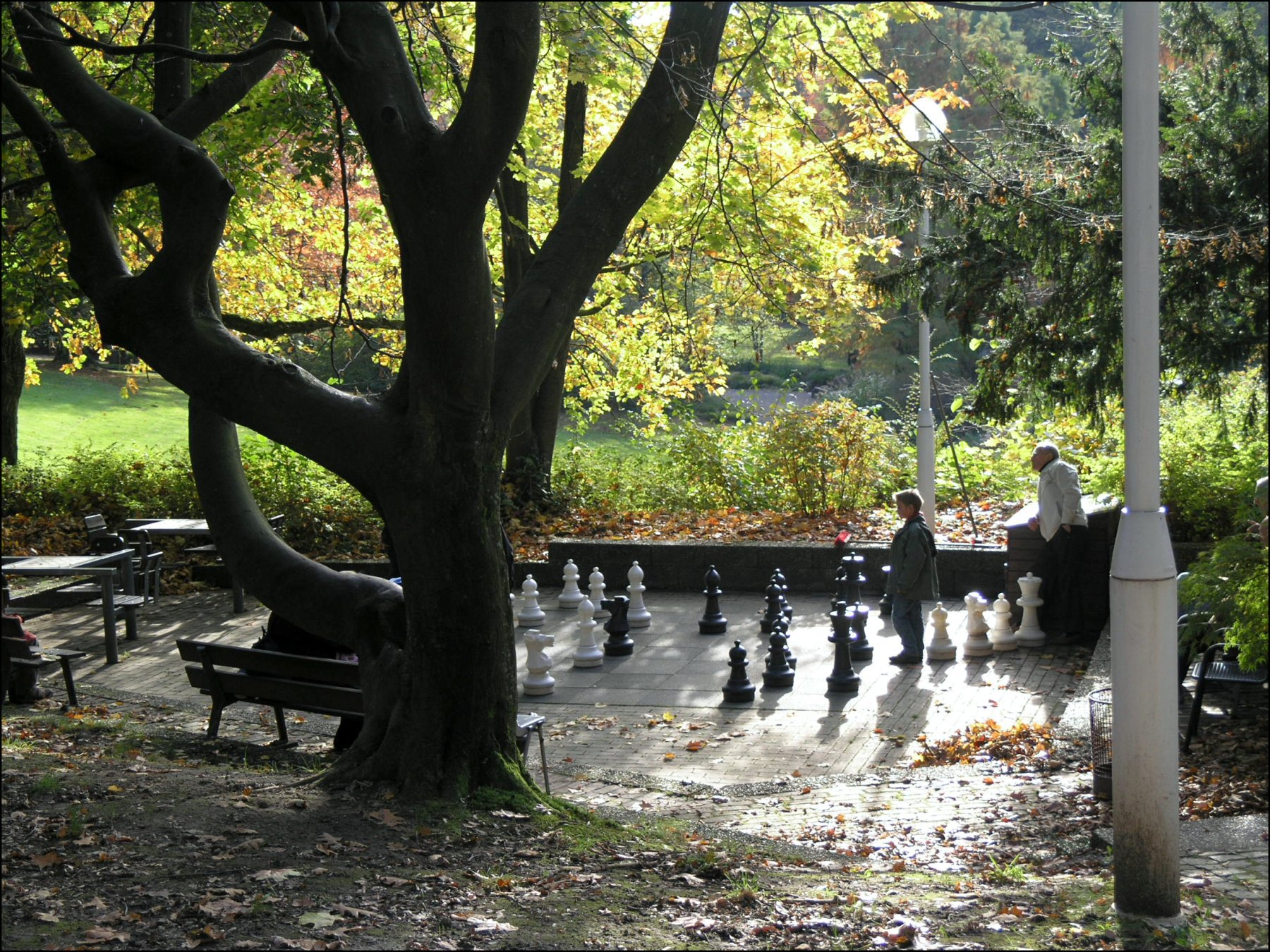 Grugapark (Essen, Germany)